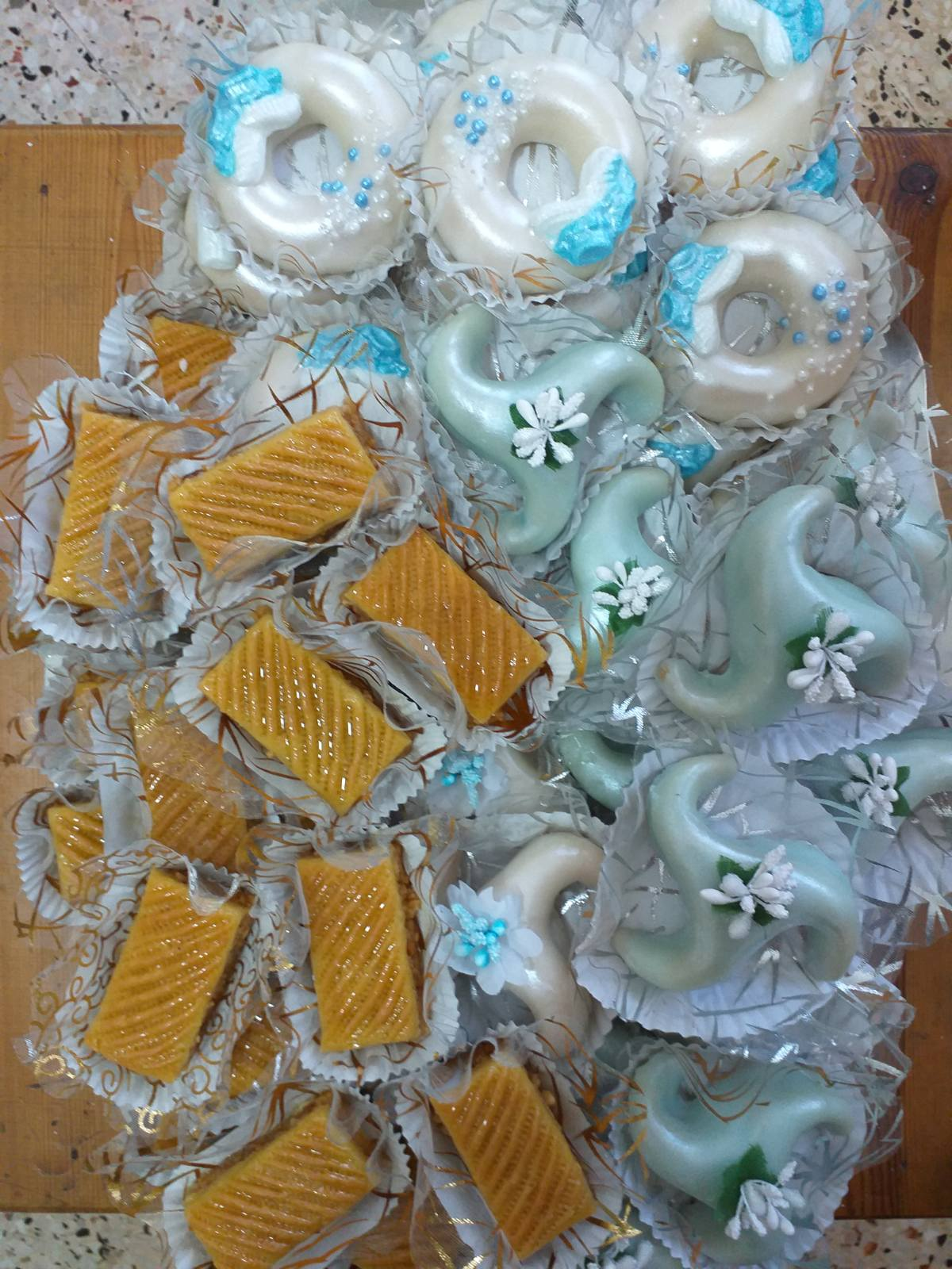 Plateau de pâtisserie algériennes